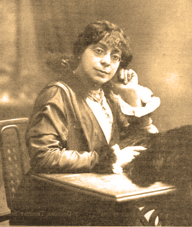 Trinitat Sais, metgessa catalana. Revista Feminal el 1914.